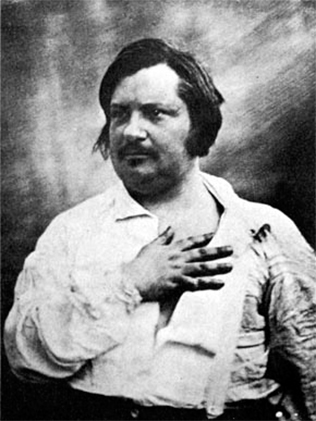 Honoré de Balzac (1799-1850)